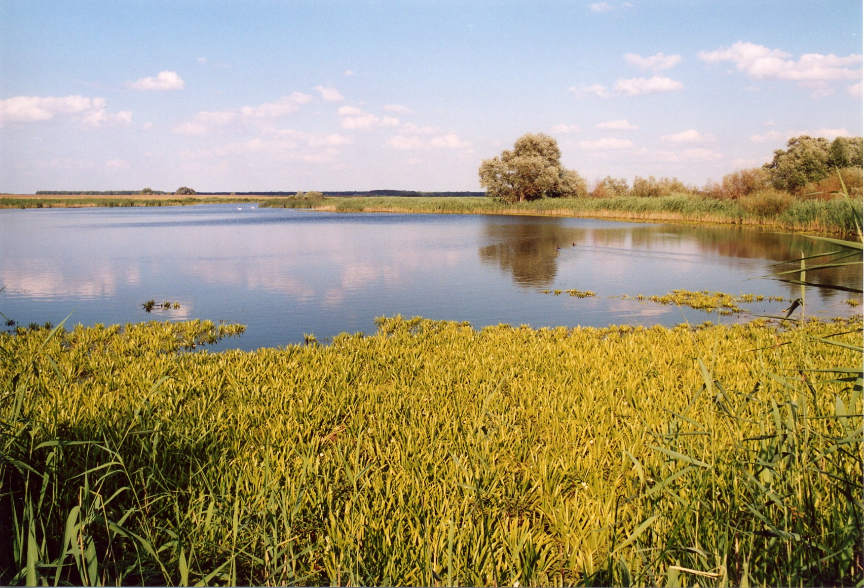 See in der Elbtalniederung nahe der Mündung des Aland im Norden von Sachsen-Anhalt (Deutschland). Im Wasser befindet sich eine große Gesellschaft der Krebsschere (Stratiotes aloides).